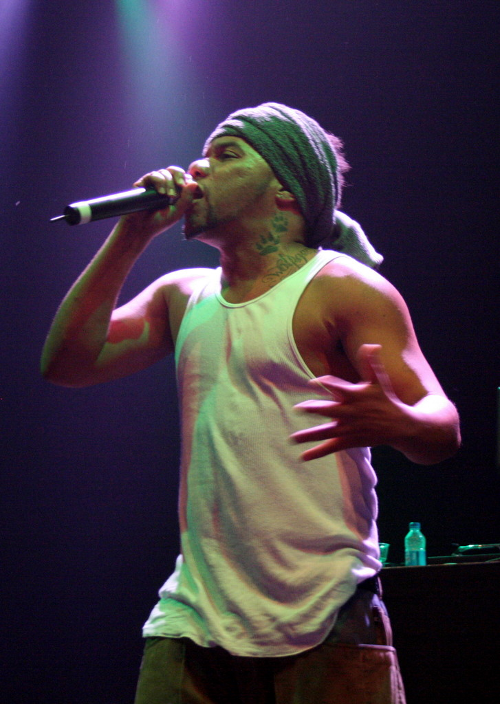 K-Solo performing in Amager Bio, Denmark.